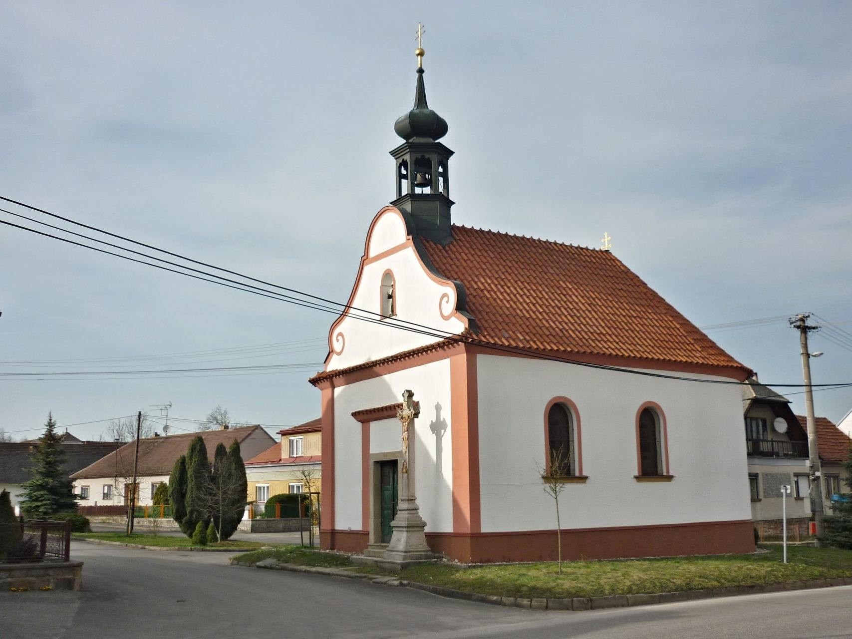 Kaple Panny Marie, náves, Červený Hrádek.